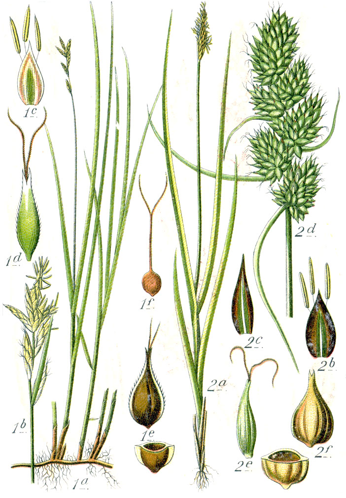 1. Carex brizoides L., 2. Carex vulpina L. Original Caption 1. Waldhaar, Carex brizoides 2. Fuchs-Segge, C. vulpina